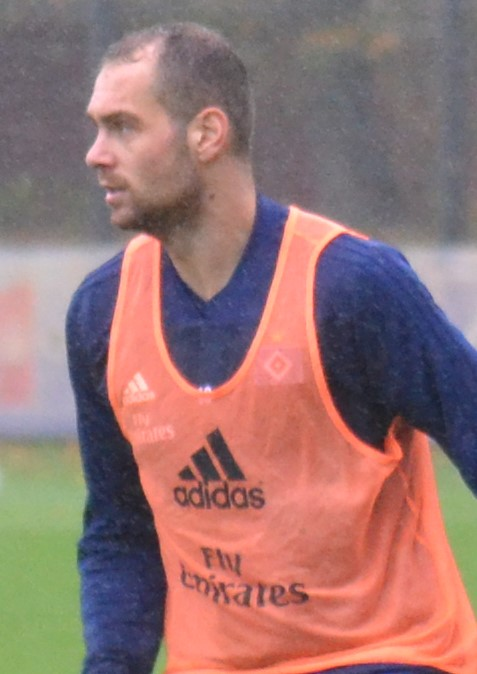 Pierre-Michel Lasogga beim Training des Hamburger SV am 18. Oktober 2018.